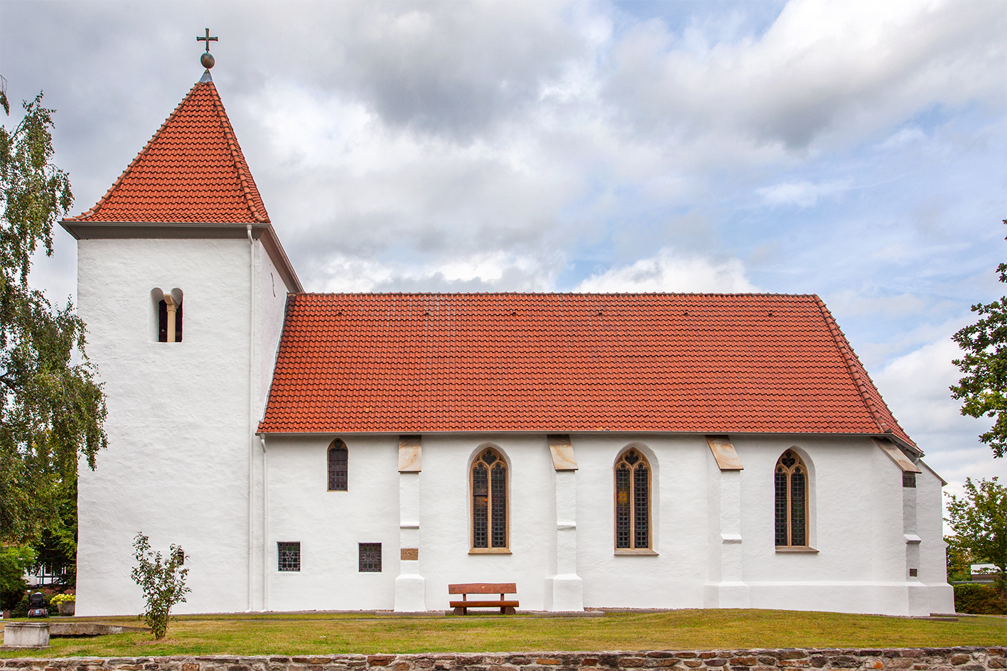 Evangelische Kirche in Holtrup This is a photograph of an architectural monument.